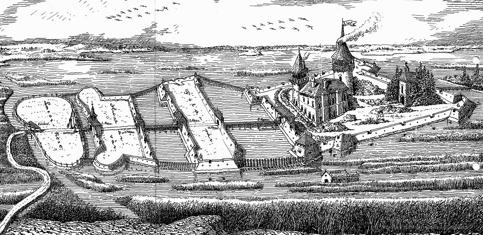 Az ecsedi vár felépült változata, amely emlékeztet a Prixner-féle rajzra (Soós Elemér könyvébõl)